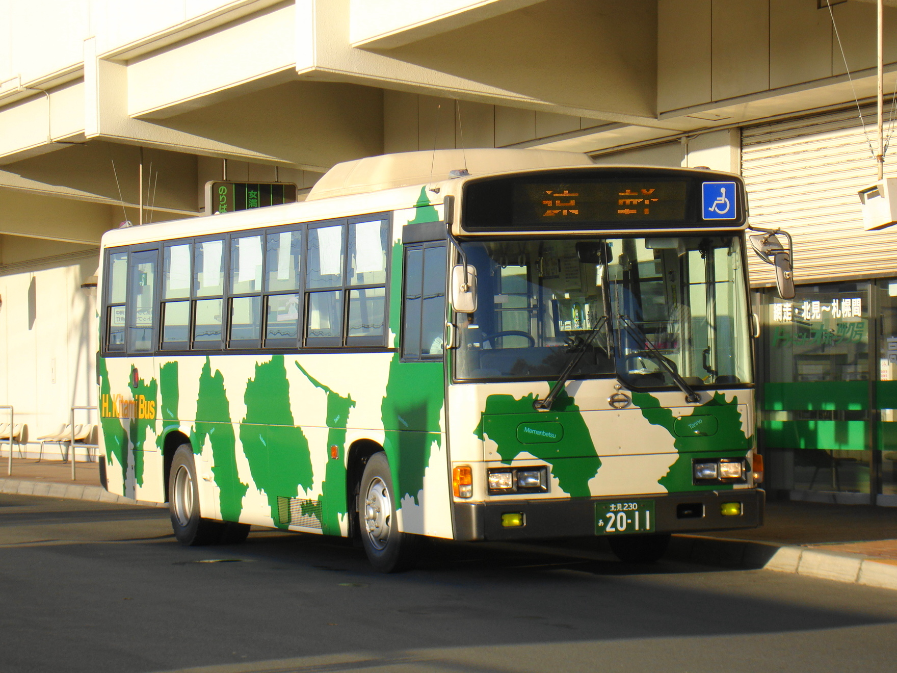 Kitami to Engaru